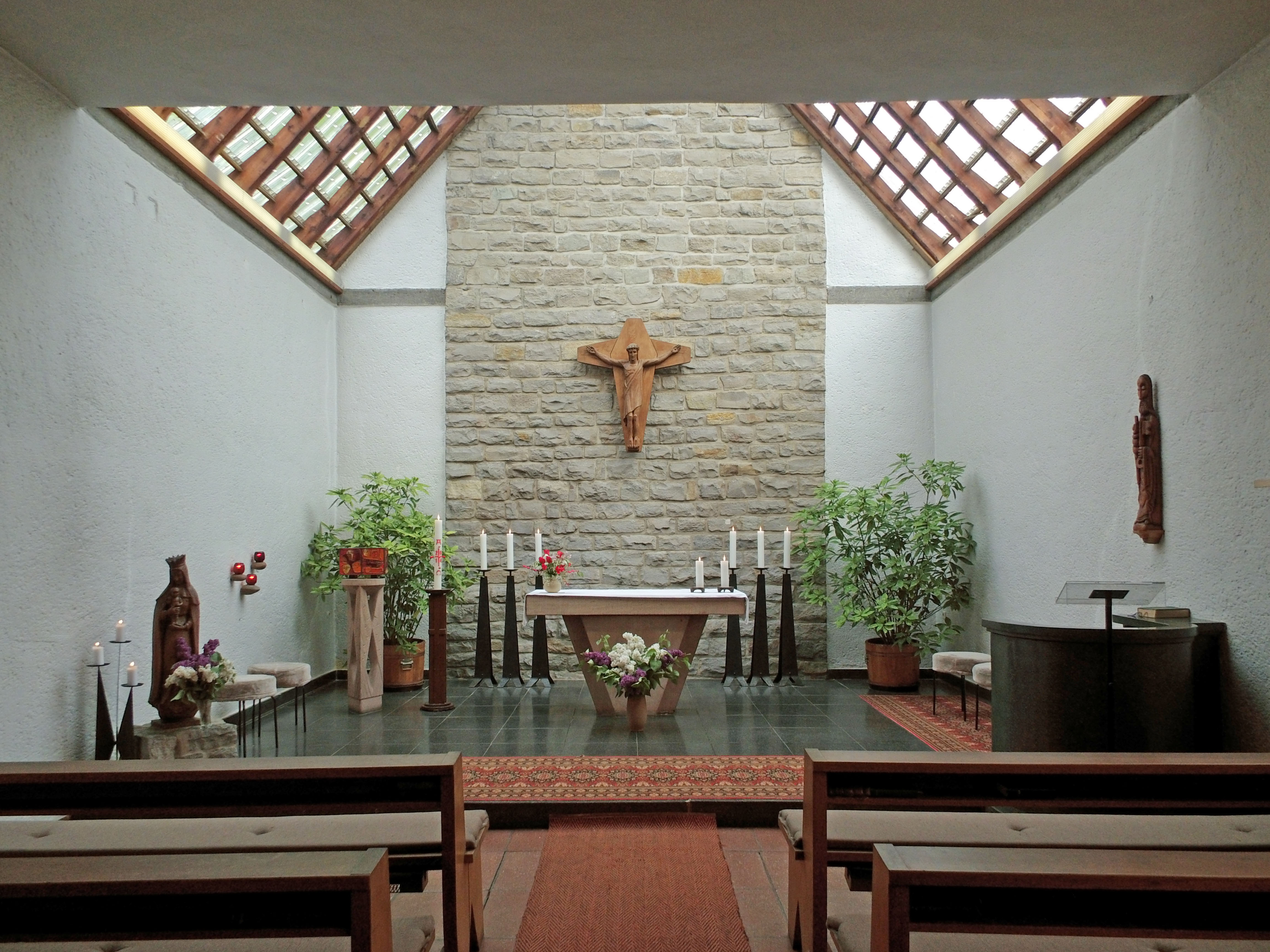 Katholische St.-Petrus-Kirche in Kalbe an der Milde (Sachsen-Anhalt)